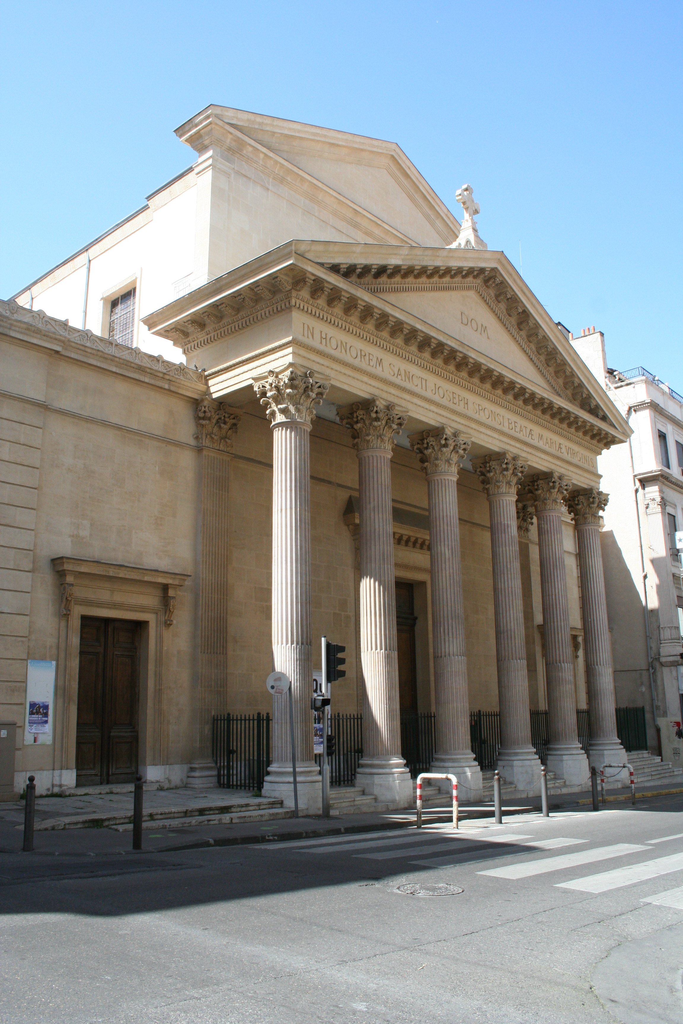 Eglise Saint-Joseph à Marseille située au N°126 de la rue Paradis.